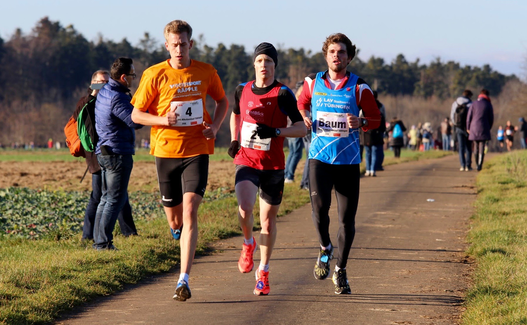 Spitzengruppe beim 40. Nikolauslauf Tübingen 2015. Von rechts: Lorenz Baum (LAV Stadtwerke Tübingen), Jens Ziganke (SV Reichenau) und Peter Obenauer (Intersport Räpple)